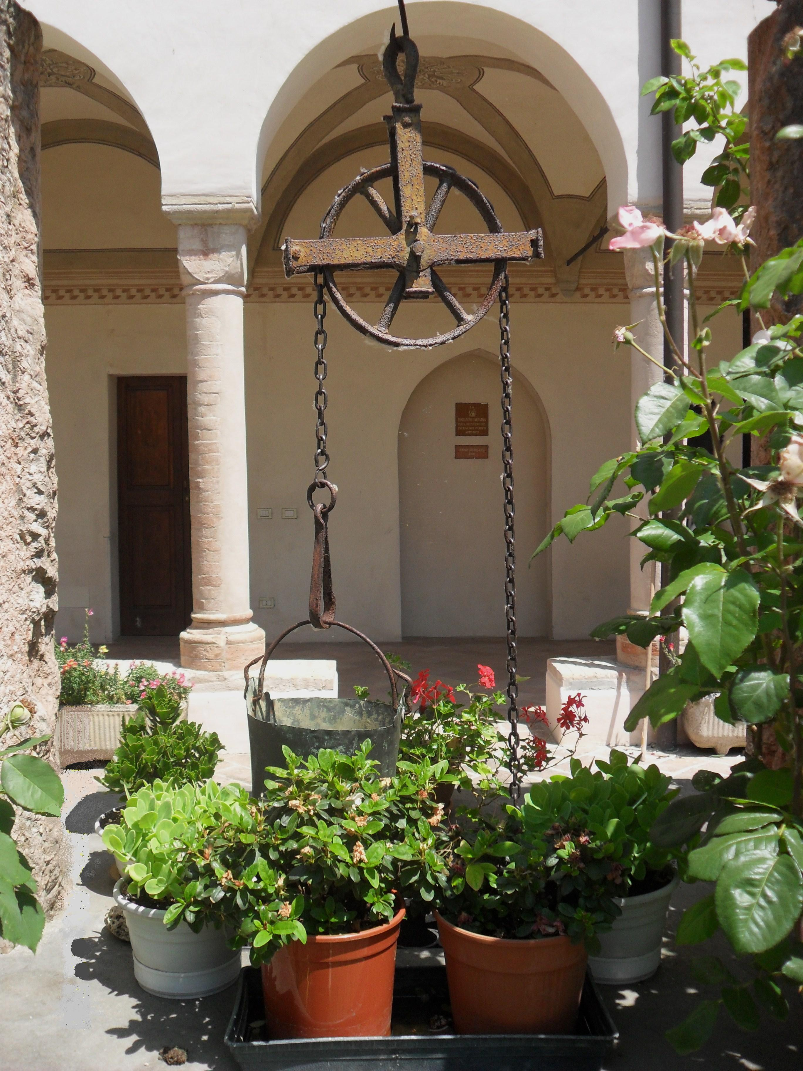 Particolare del pozzo all'interno del chiostro della Badia di Santa Maria della Neve (Torrechiara).